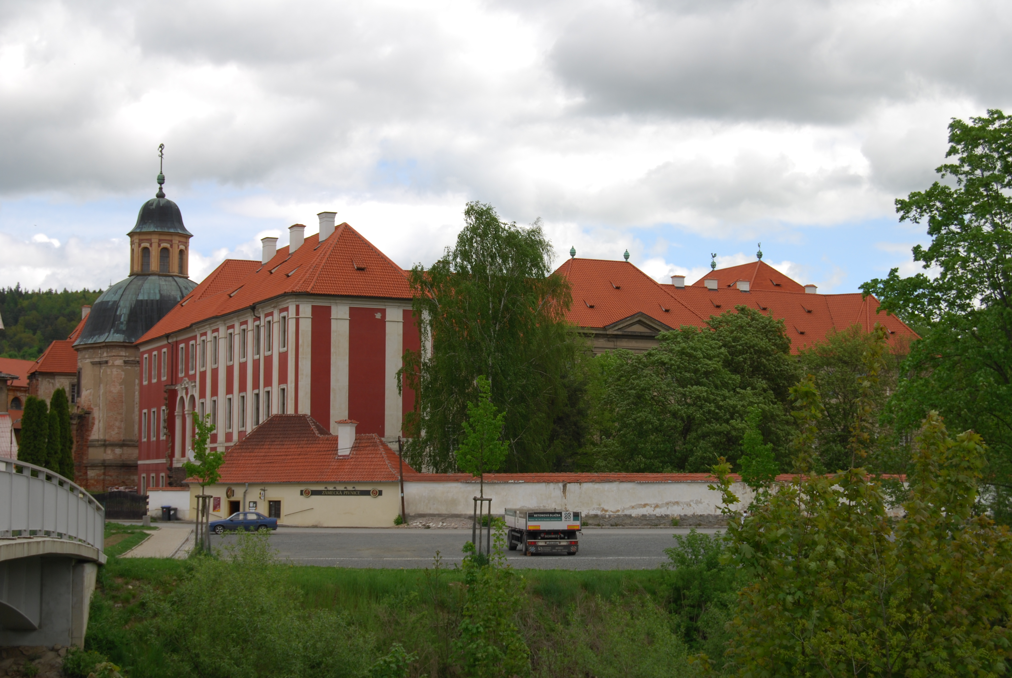 Pohled na areál kláštera. Klášter Plasy v městečku Plasy v okrese Plzeň-sever. Česká republika. - Google Maps - Google Earth